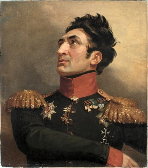 Портрет Б. В. Полуектова